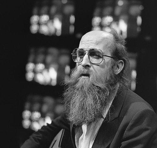 Pierre Kartner als Vader Abraham in Op volle toeren in 1980